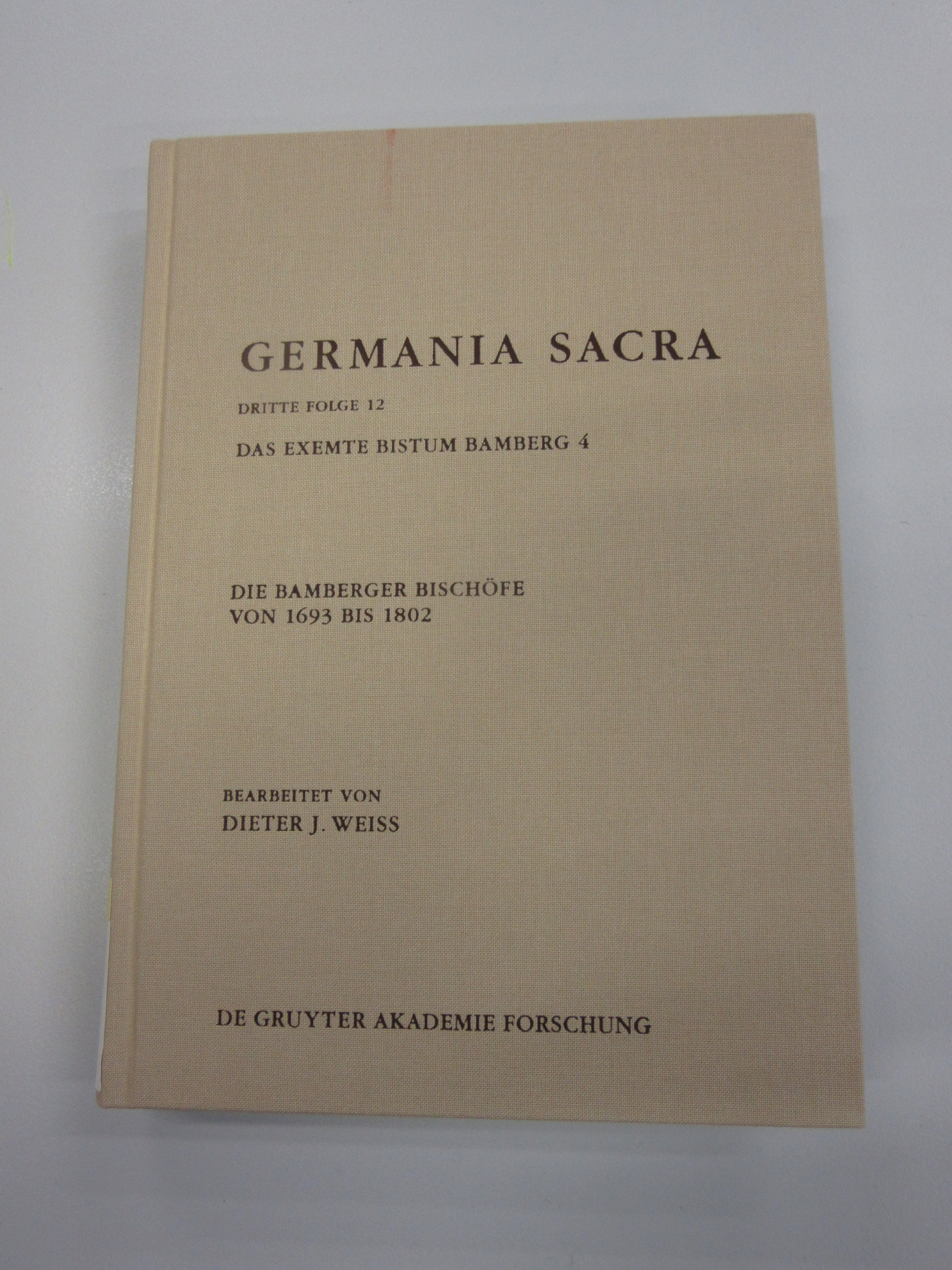 Buch der Germania Sacra